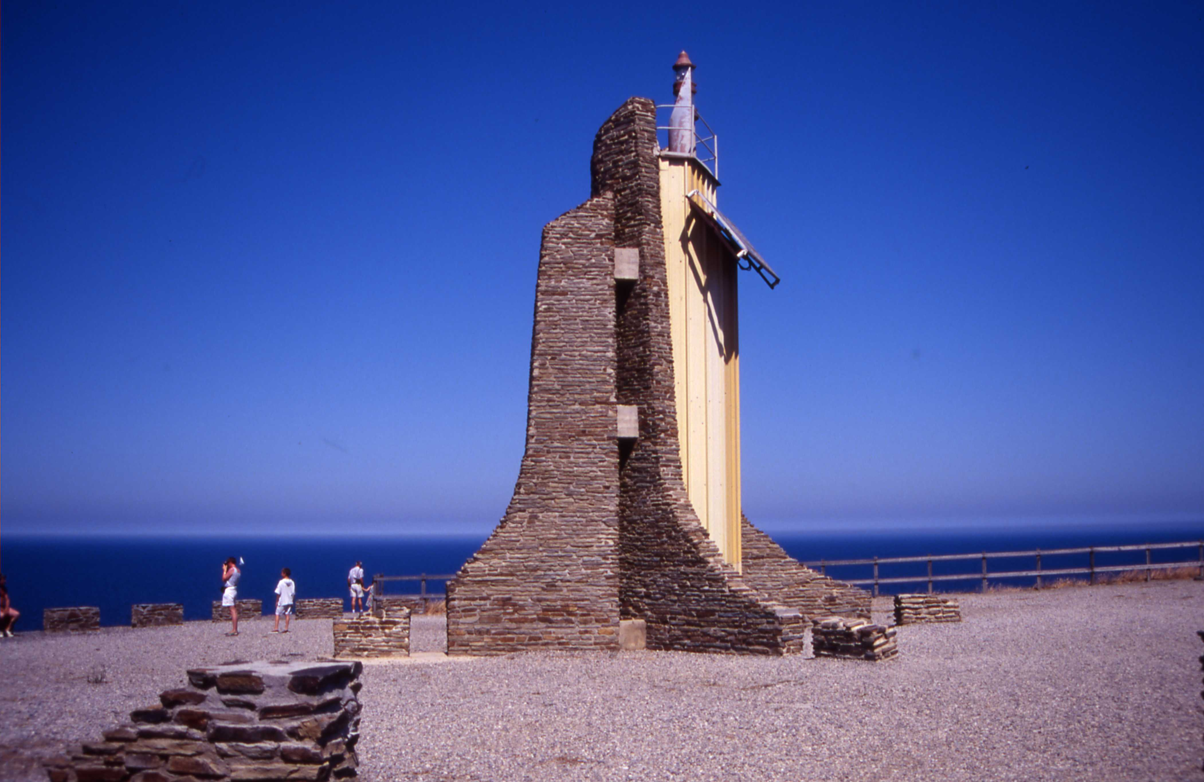 Le phare du cap Cerbère, Pyrénées-Orientales, France. Août 1993.